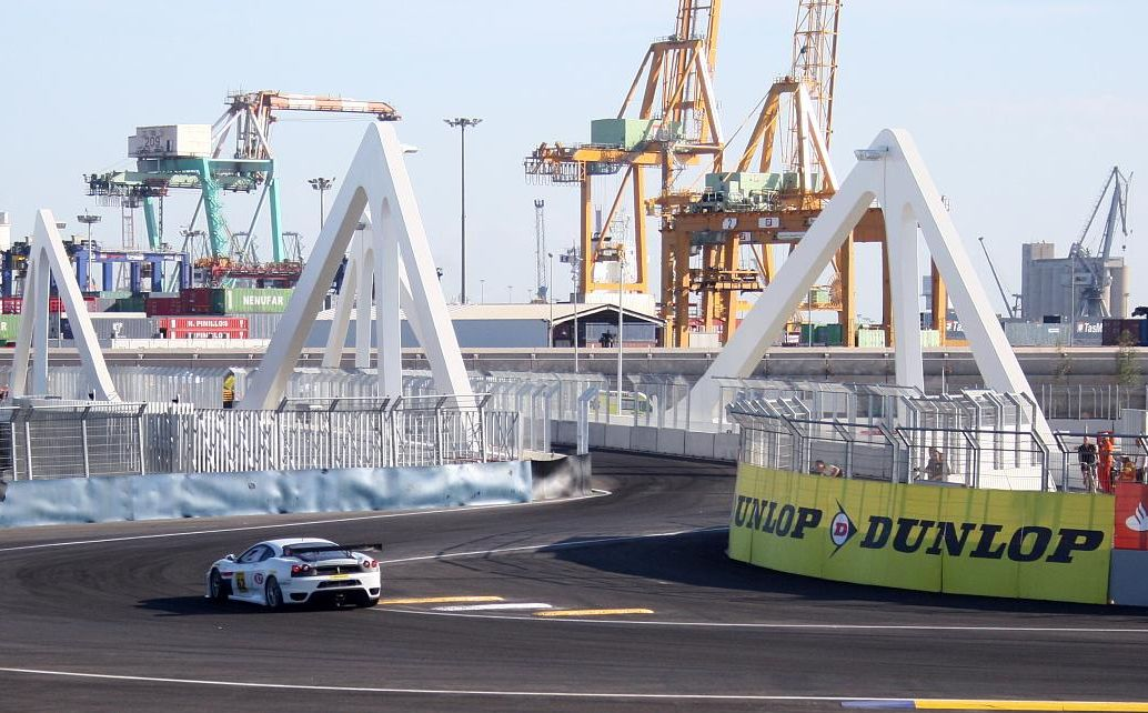 Formula GT @ Valencia Street Circuit